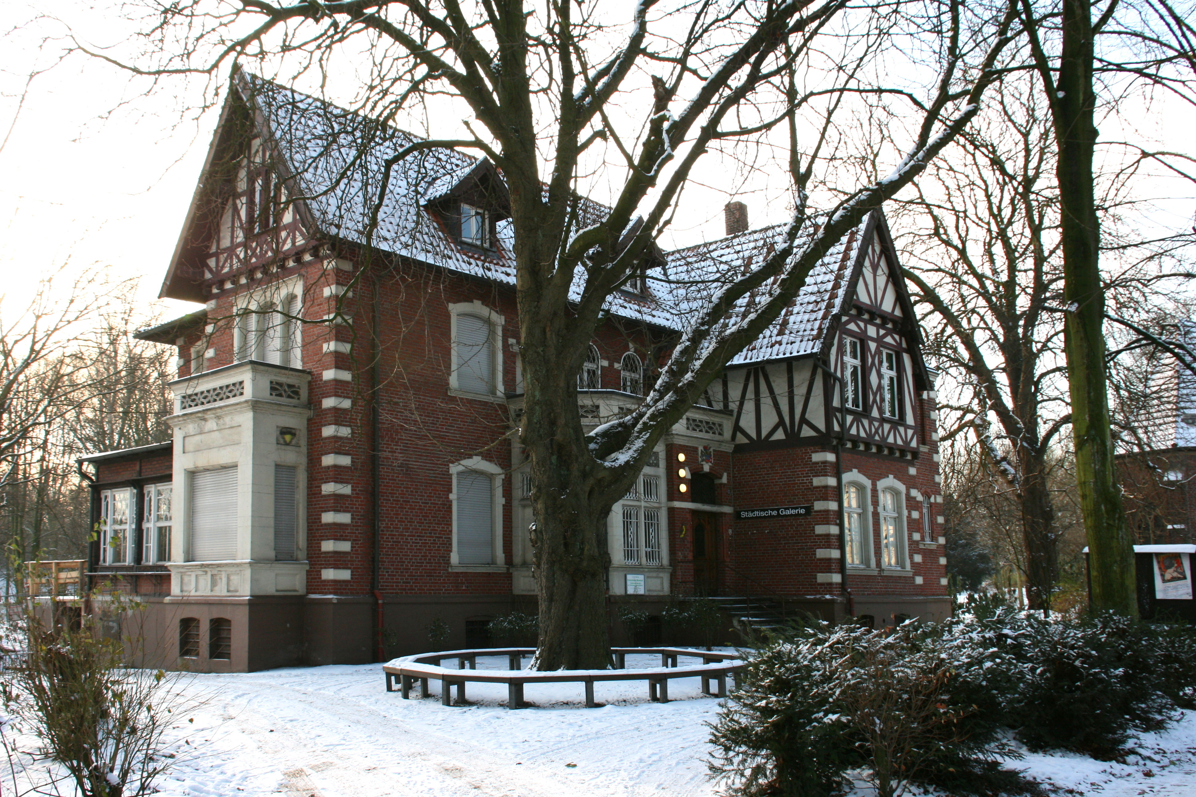 Städtische Galerie in der Villa Forell, Karl-Brandt-Weg 2, Schlosspark Strünkede in Herne